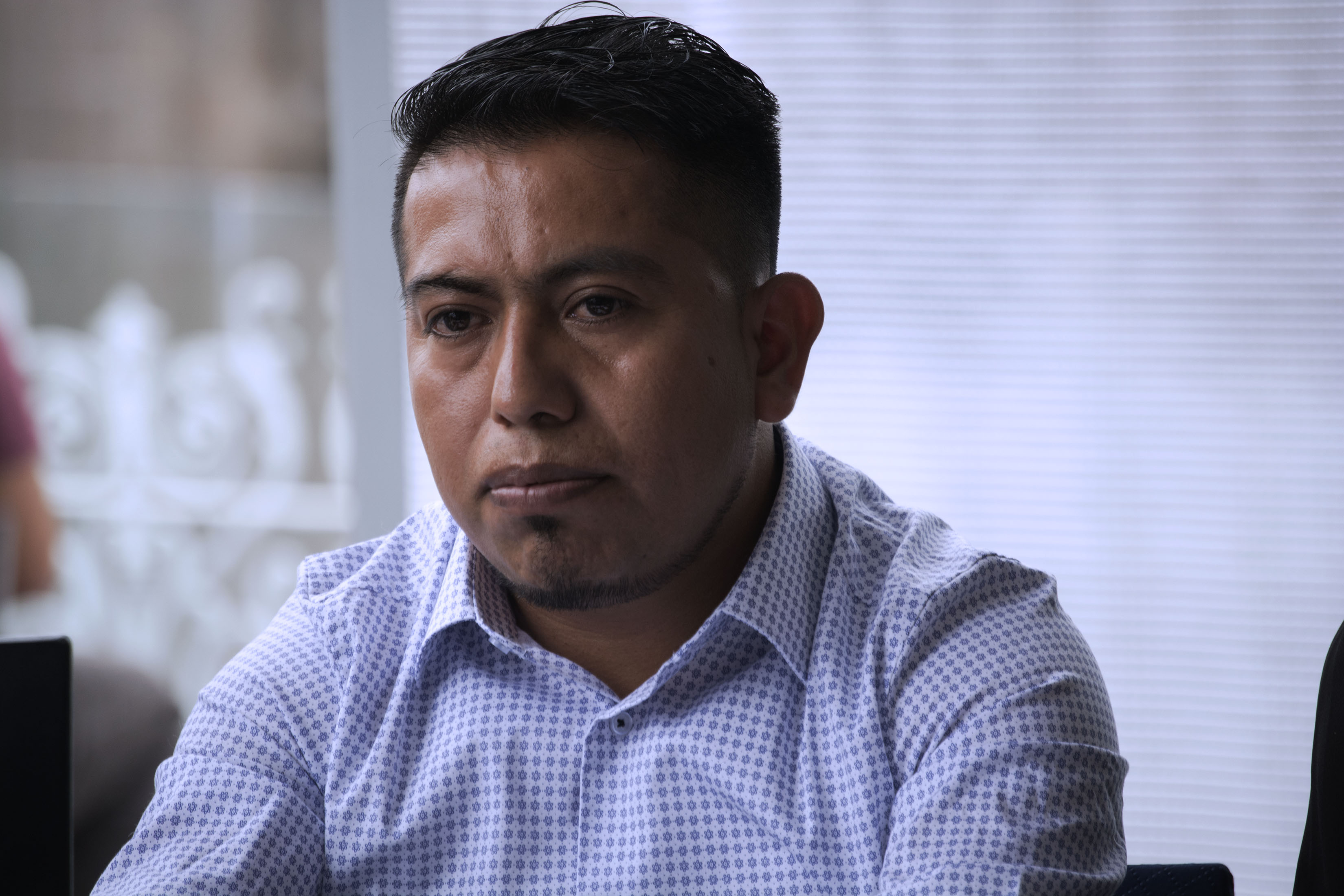 Viernes 30 de junio de 2017. Como parte de las actividades de Di / Verso. 2º Encuentro de Poemas de la Ciudad de México, con sede en la Terraza del Museo del Estanquillo, se realizó la mesa de discusión: Poetas de los cinco continentes; con la participación de Hera Lindsay Bird (Oceanía), Najwan Darwish (Asia), Kwame Dawes (África), Dovilé Kuzminskaité (Europa), Francisco Larios (América), Omar Sakr (Oceanía), Josef Straka (Europa), Valeria Tentoni (América), Martín Tonalmeyotl (América) y Modera: Gustavo Osorio de Ita (moderador). Fotografía: Mariano Castillo / Secretaría de Cultura CDMX.